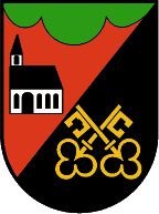 Sankt Anton im Montafon, Vorarlberg: In einem von Rot und Schwarz schräglinks geteilten Schild rechts ein gestürzter grüner Dreiberg am Oberrand, darunter eine schwarzbedachte, silberne Kirche, links ein gekreuztes goldenes Schlüsselpaar. (Verleihung: 8. November 1966)